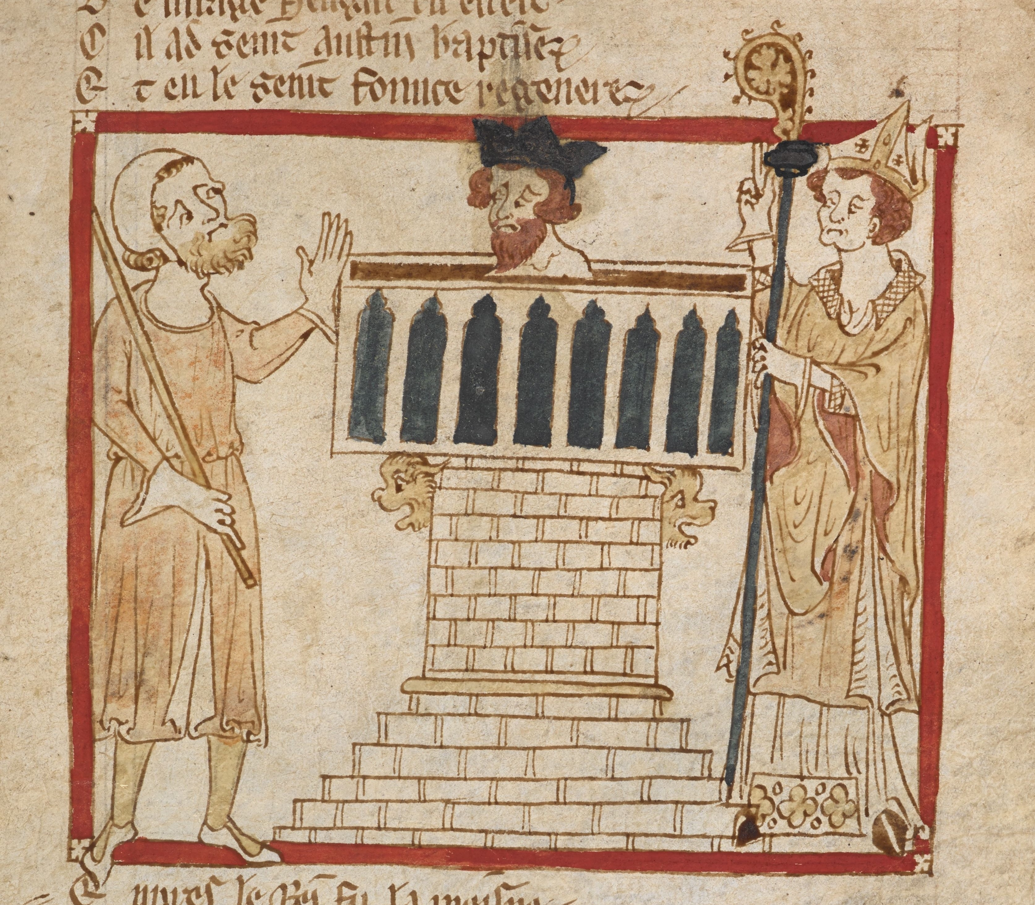 Le baptême d'Æthelberht de Kent, détail d'une miniature d'un manuscrit du Roman de Brut abrégé.